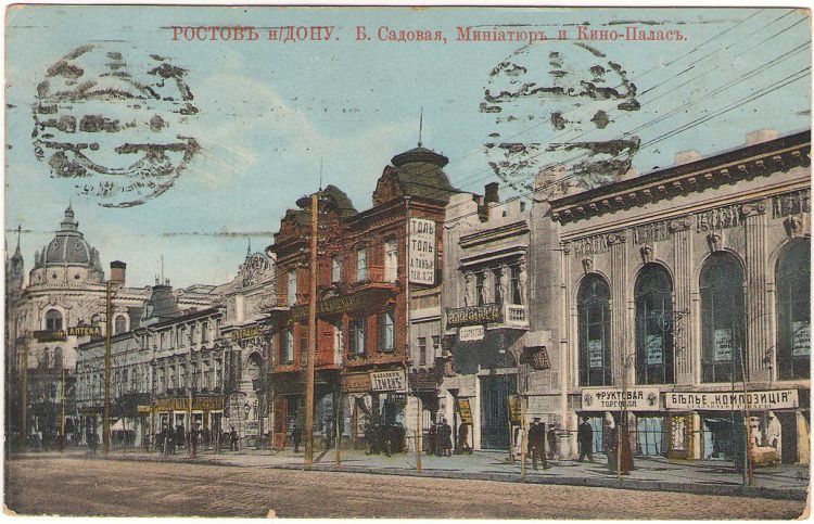 Ростов-на-Дону улица Большая Садовая